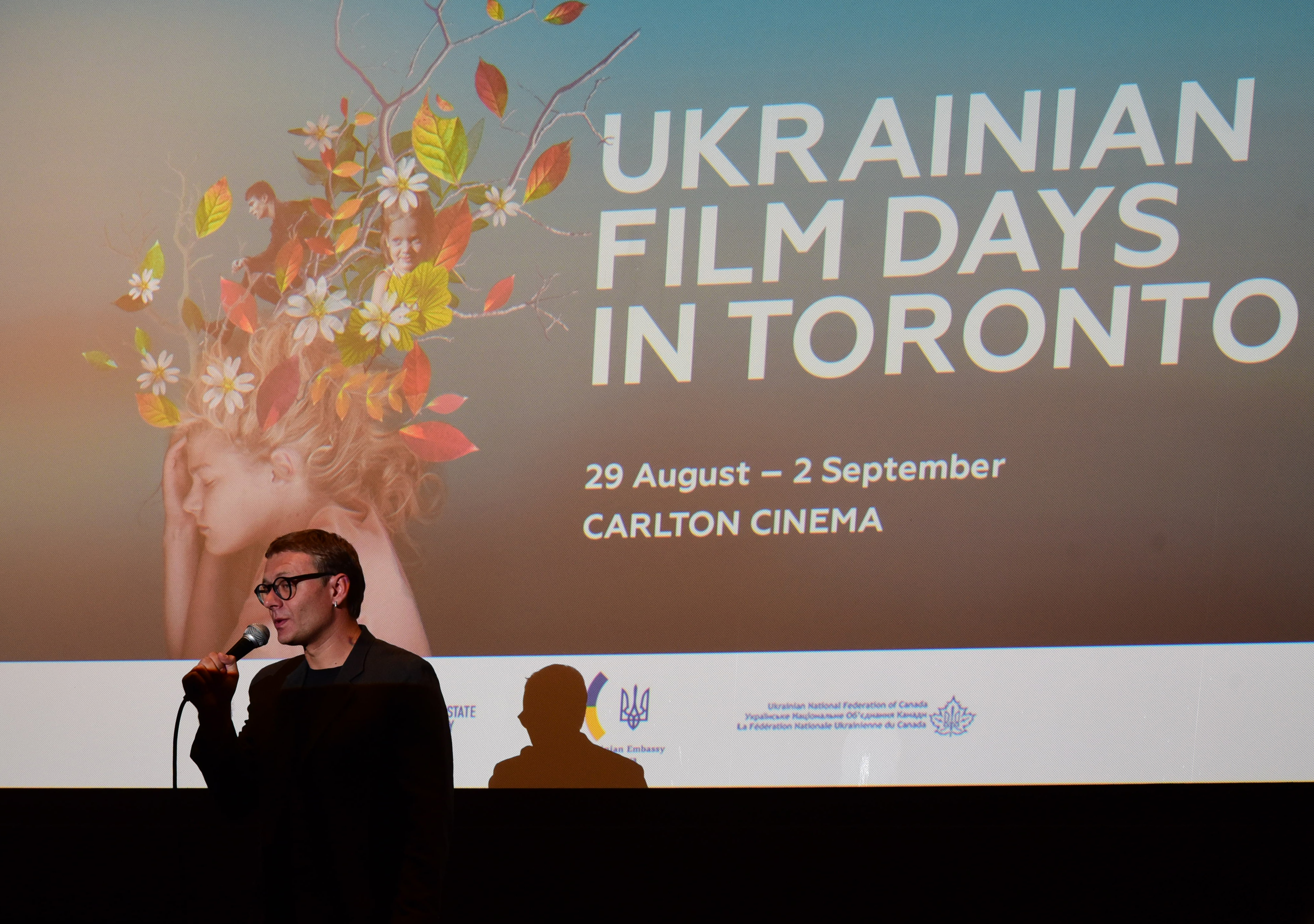 Український продюсер Денис Іванов на Днях українського кіно в Торонто